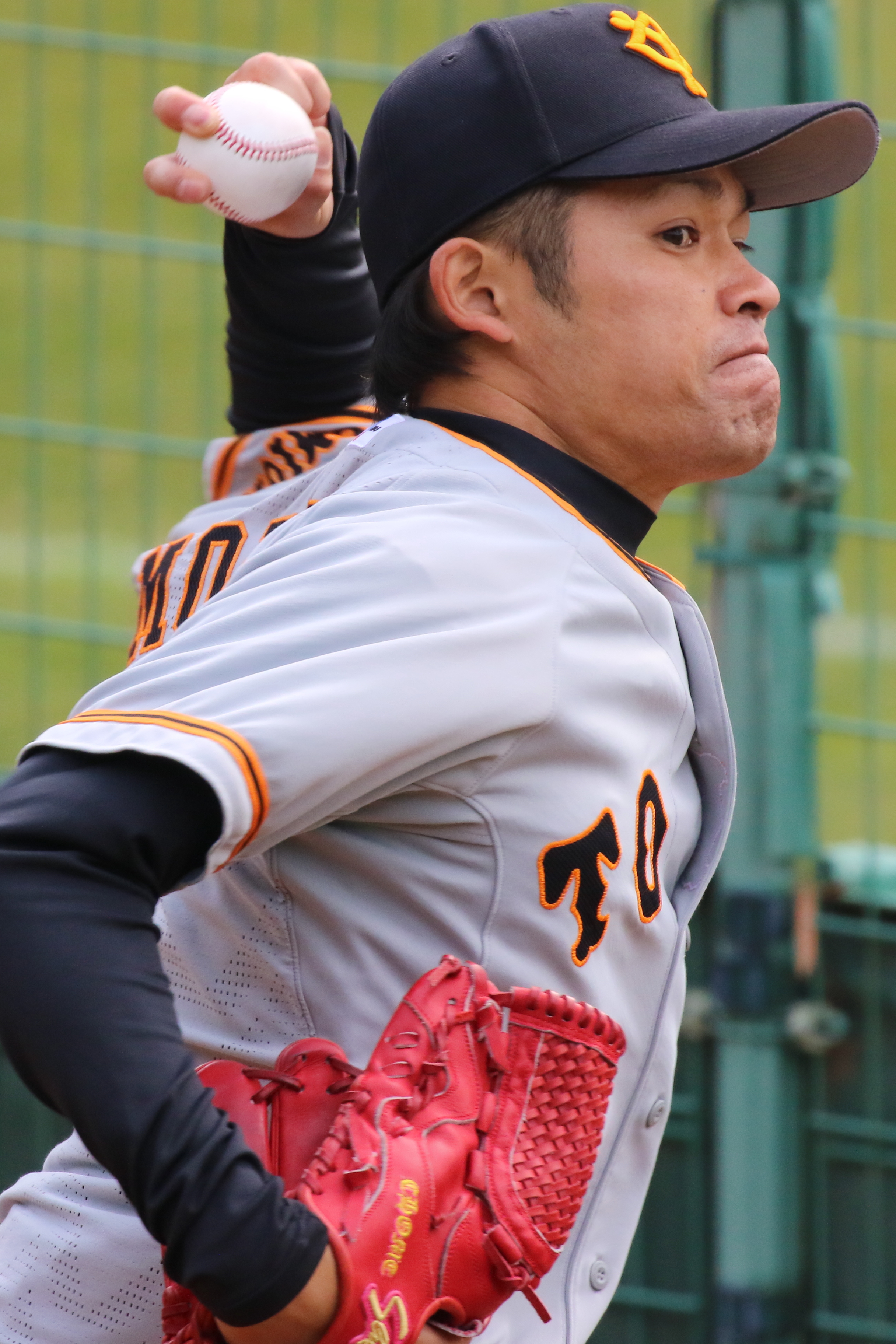 ジャイアンツ森福選手